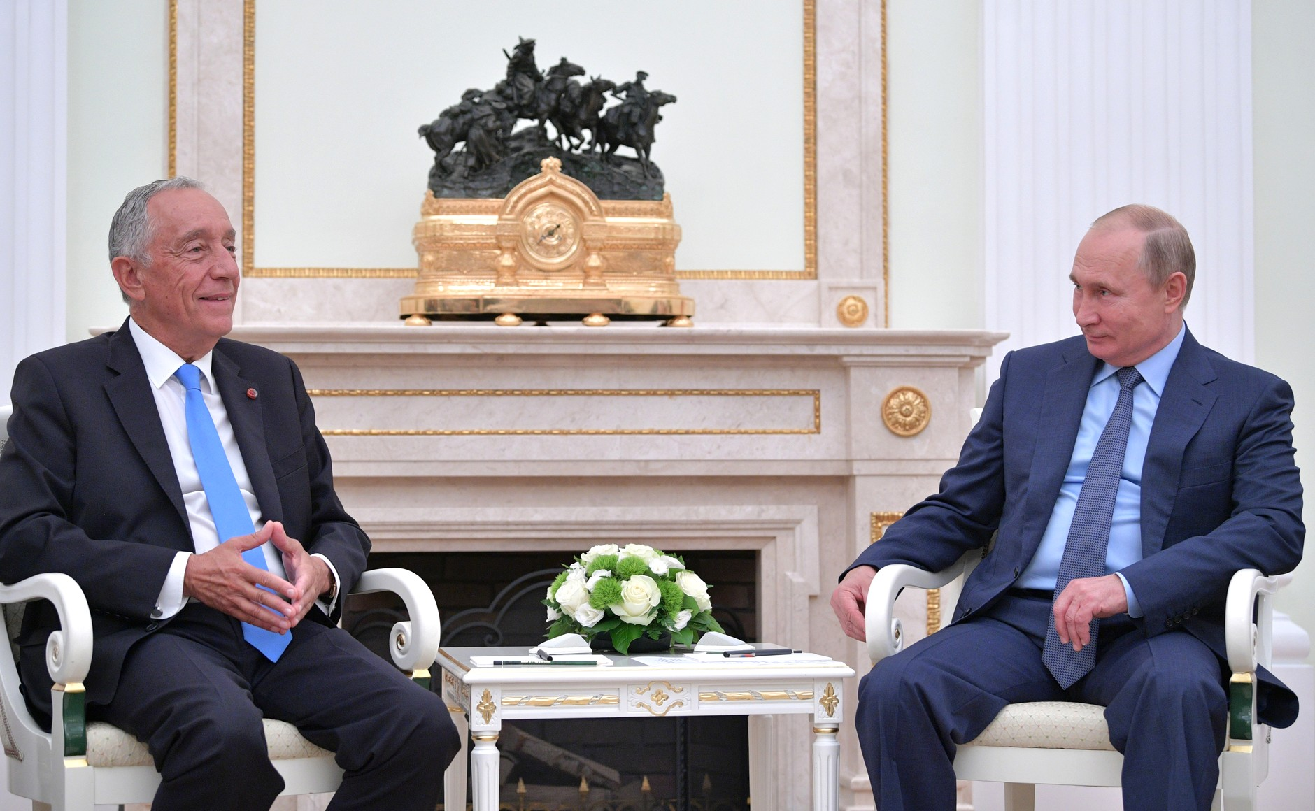 С Президентом Португалии Марселу Ребелу де Соузой.